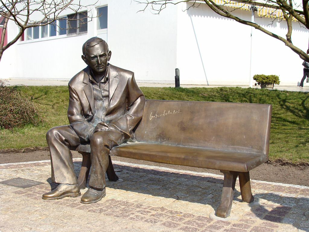 Pomnik - Ławeczka Gustawa Holoubka, autorstwa Michała Selerowskiego (odsłonięta w 2008 r.) przy Alei Gwiazd w Międzyzdrojach